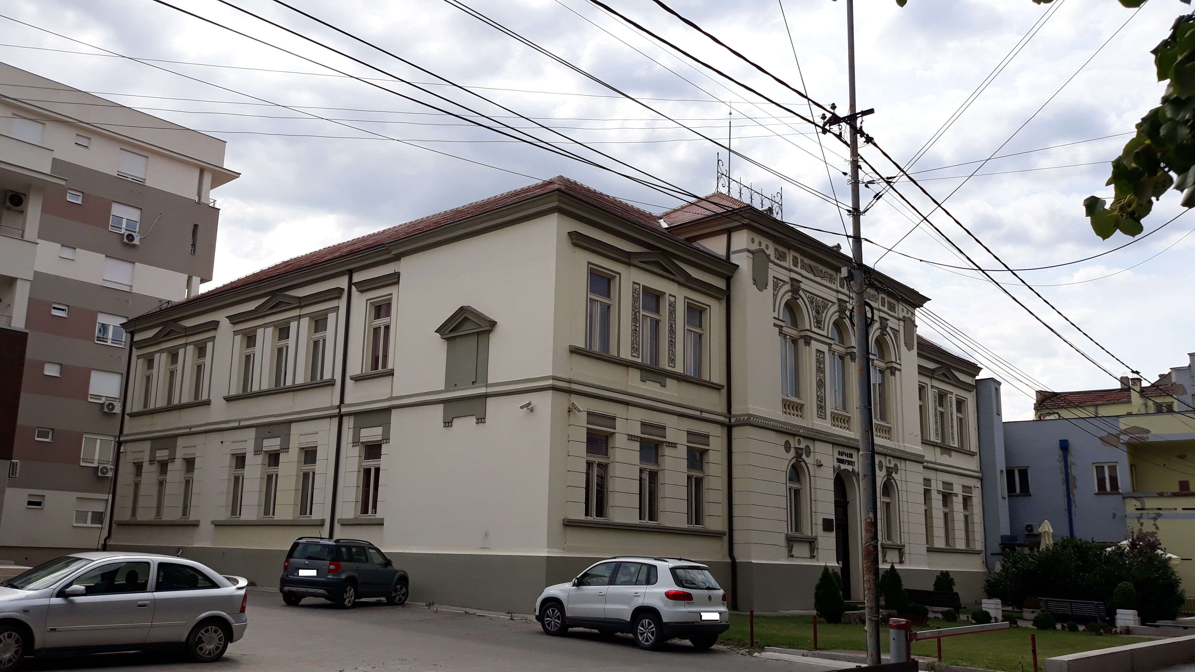 Зграда Народног универзитета у Крушевцу